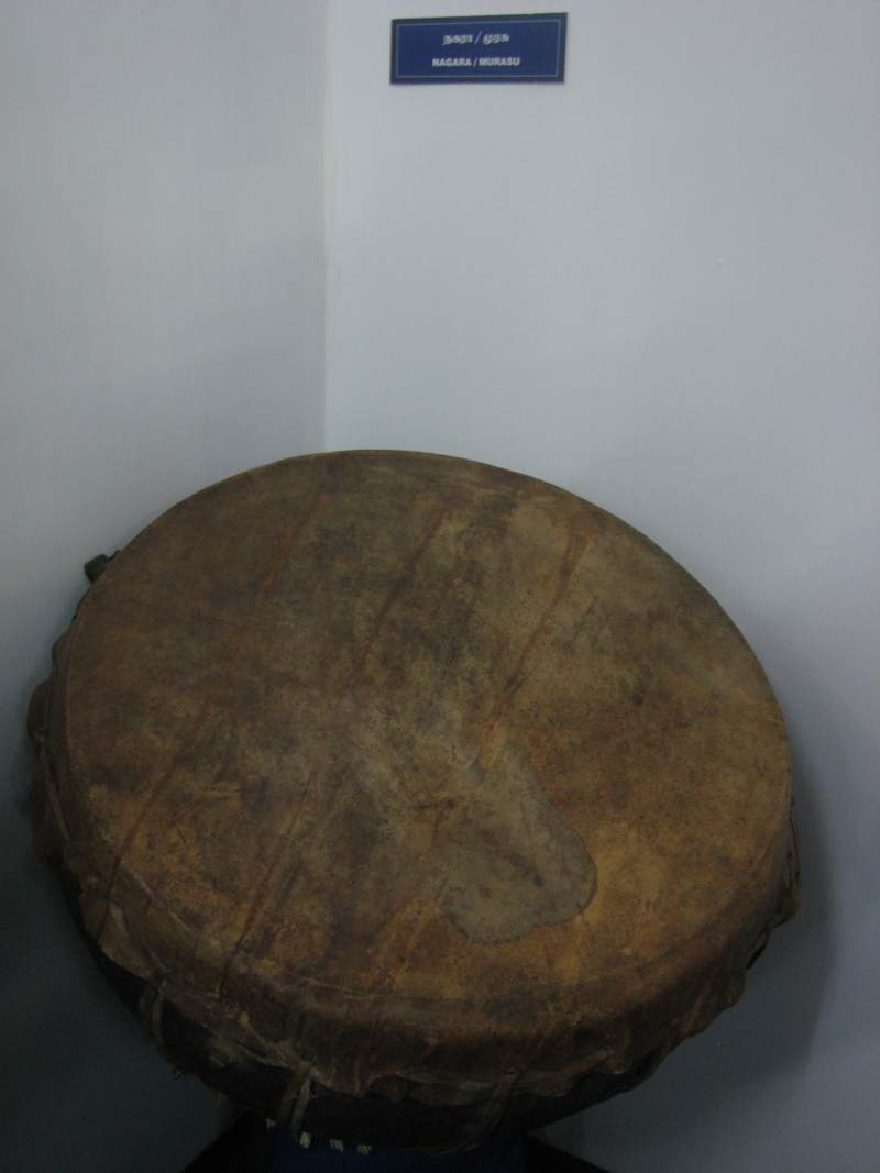 நகரா, முரசு --மாஹிர் 17:01, 30 ஜூன் 2010 (UTC)